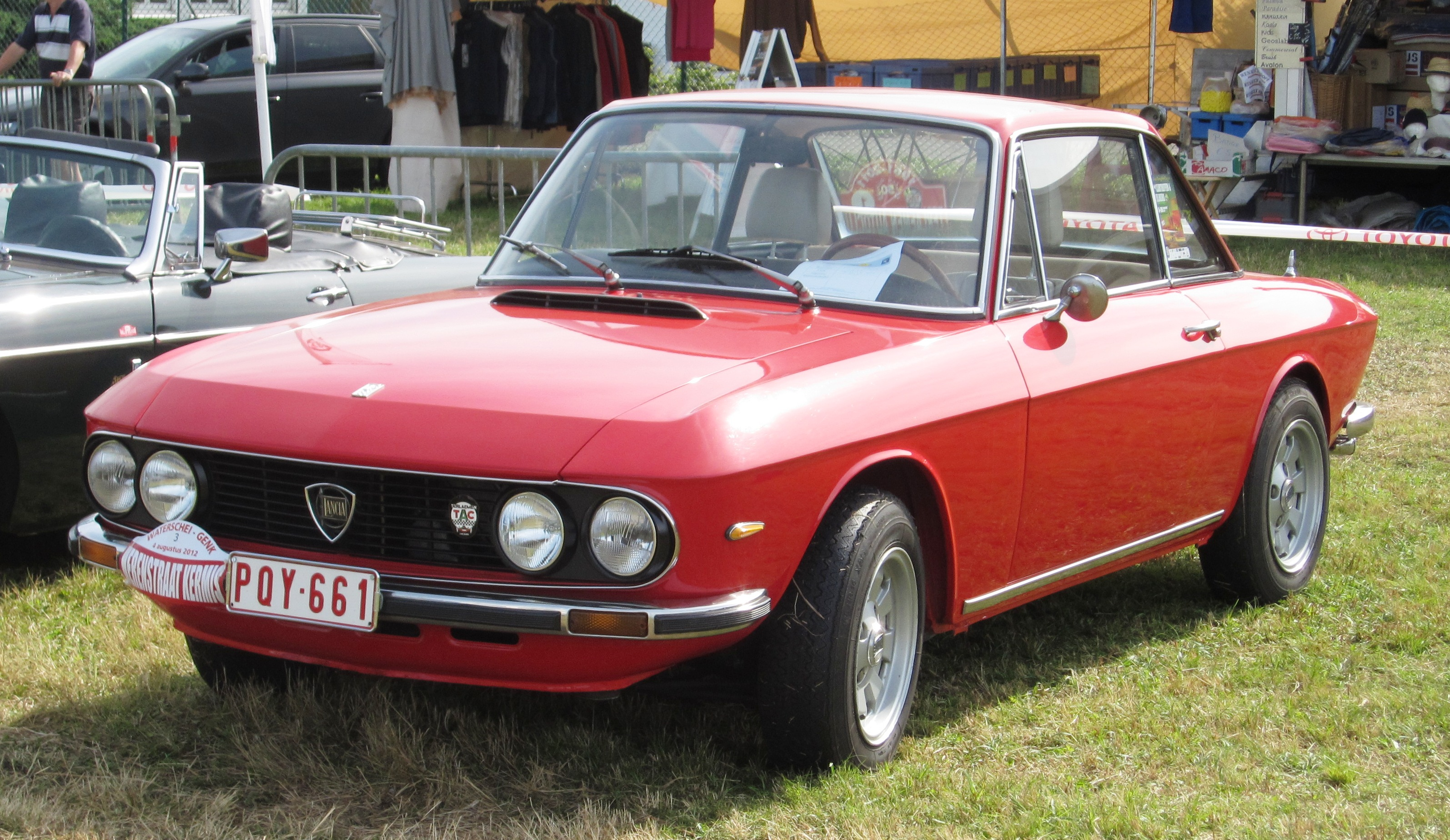 Lancia Fulvia Coupe vers 1974